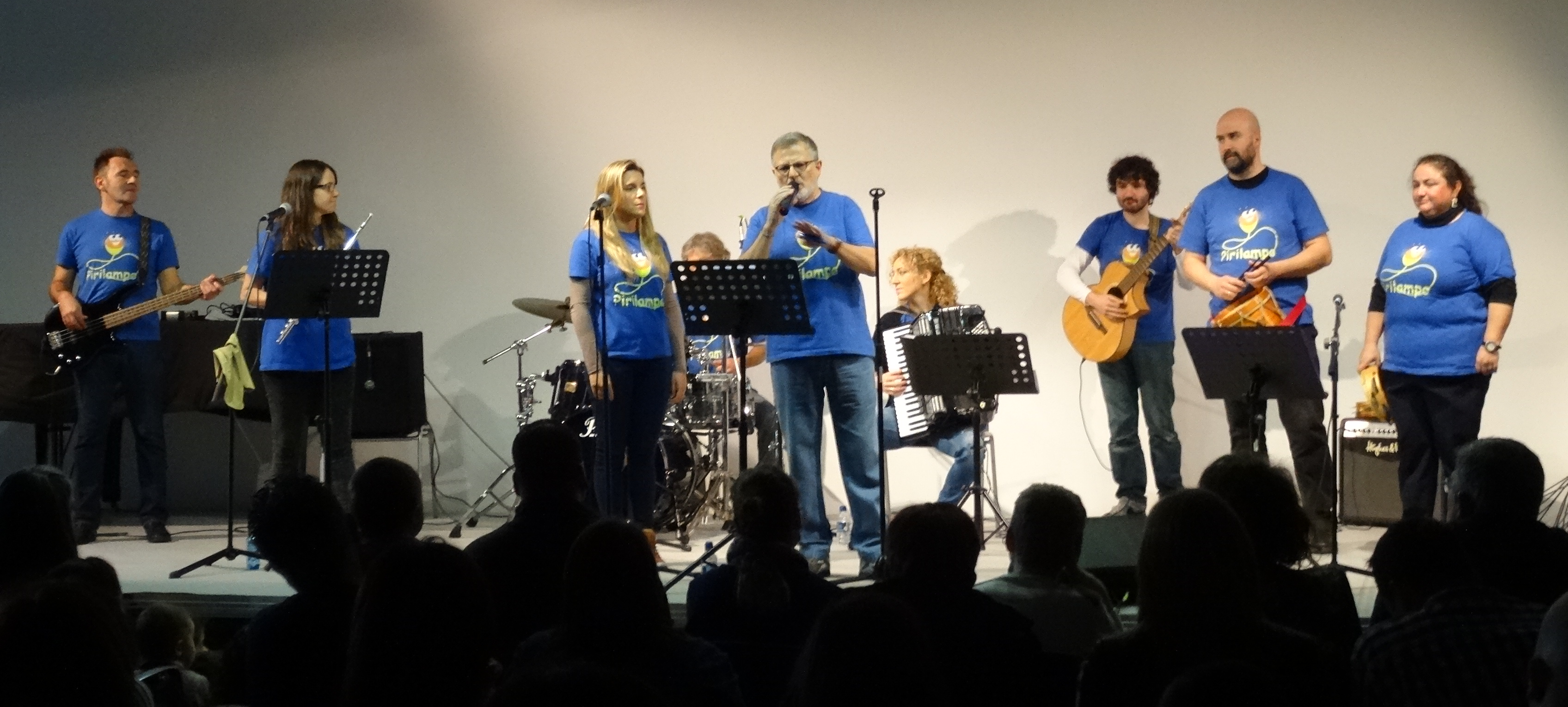 Ver título.